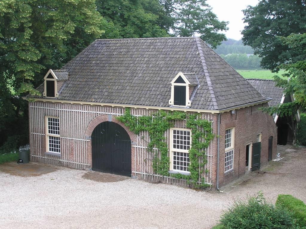 Koetshuis achterzijde